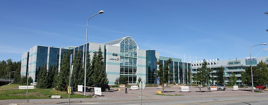 Jaakonkatu 2 Vantaan Vantaankosken aseman lähellä. Tiloissa toimii esimerkiksi norjalaisen tietotekniikkakonserni Atean suomalainen tyträryhtiö, Atea Finland. Kuvan oikeassa laidassa näkyy viereinen Pöyryn pääkonttori. Huom: Muista säilyttää viittaus kuvaajaan, mikäli käytät kuvaa.